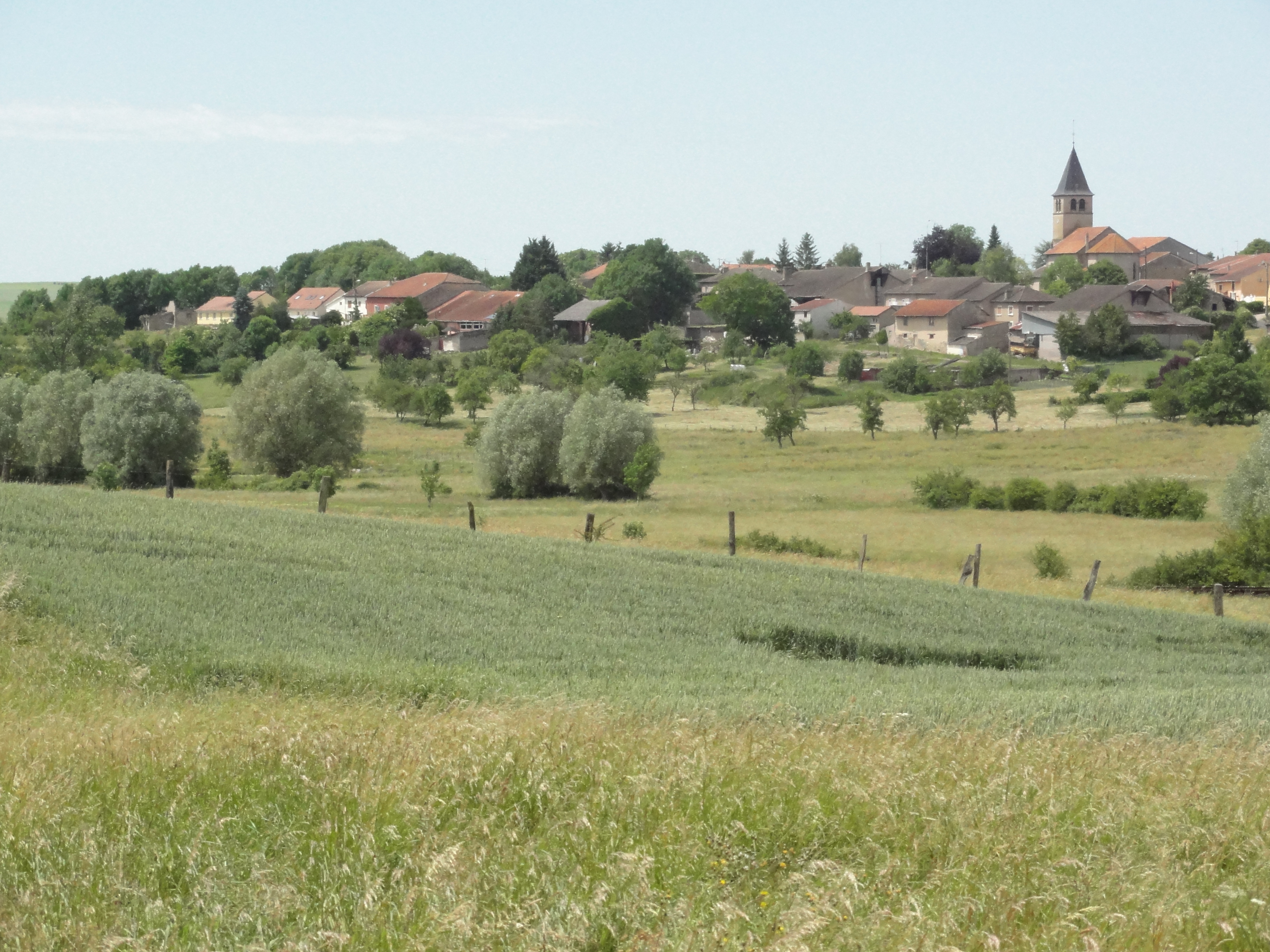 Juvelize (Moselle) vue du village